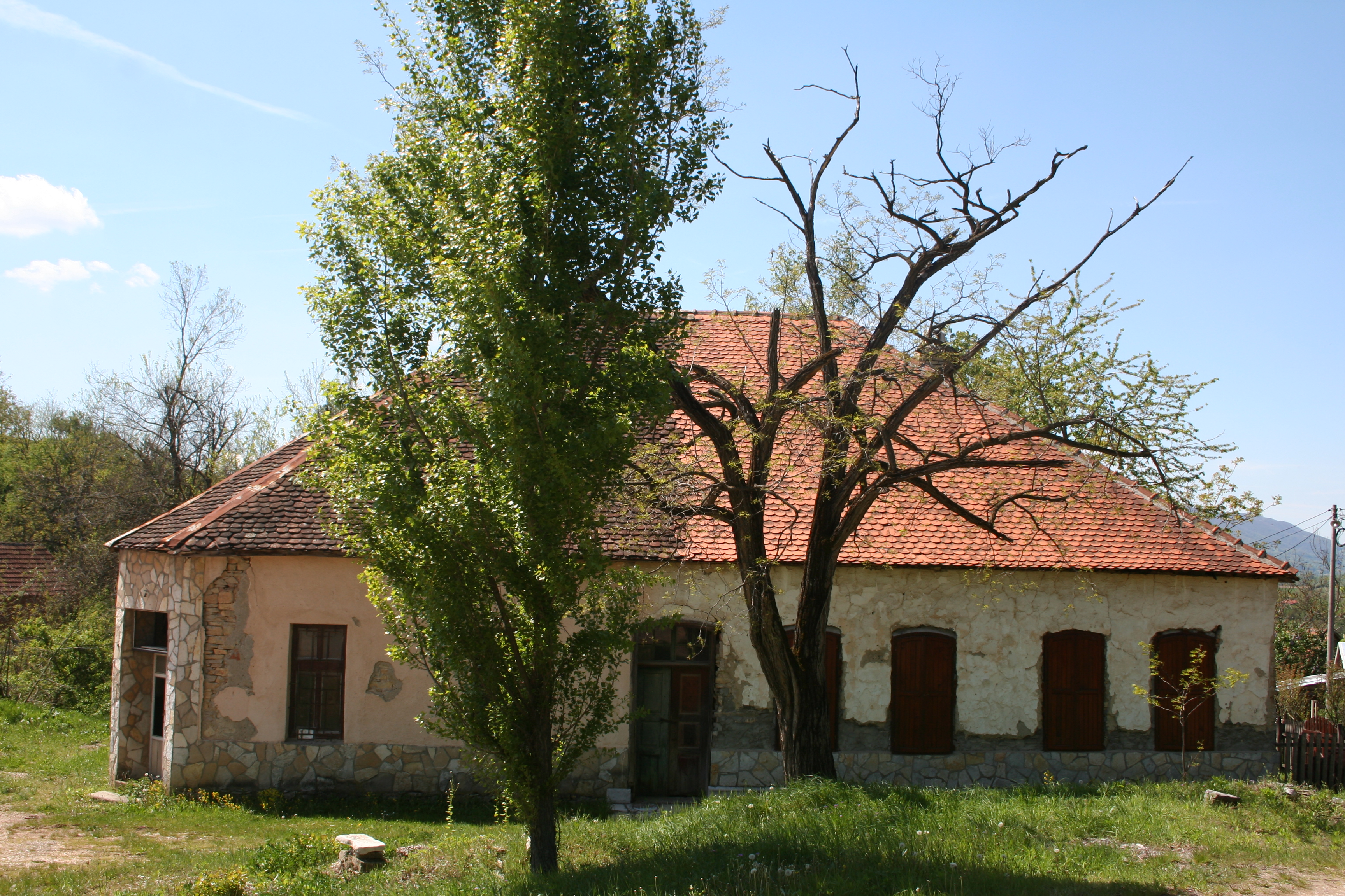 Seoska "meana" u Struganiku